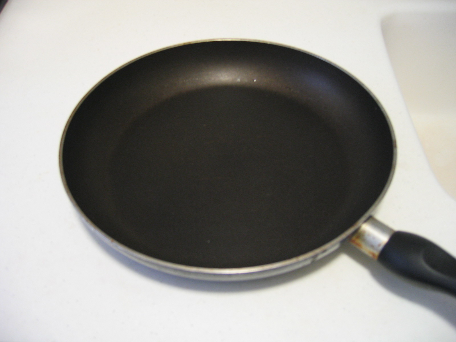 鋁製平底鍋，由Wilfred S Pau拍攝。